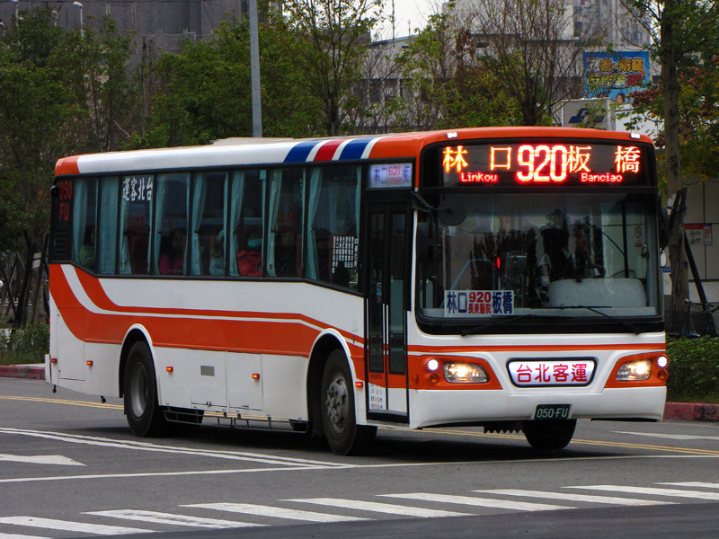 台北客運2010年日野RK8JRSA單門大客車050-FU。